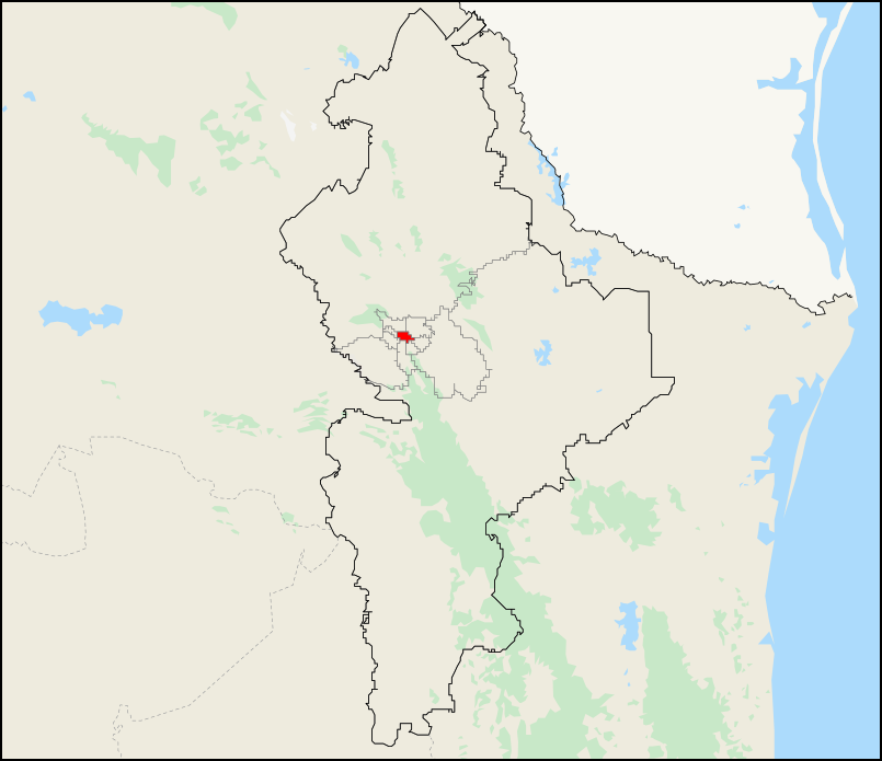 Mapa del distrito electoral federal 5 ubicado en Nuevo León